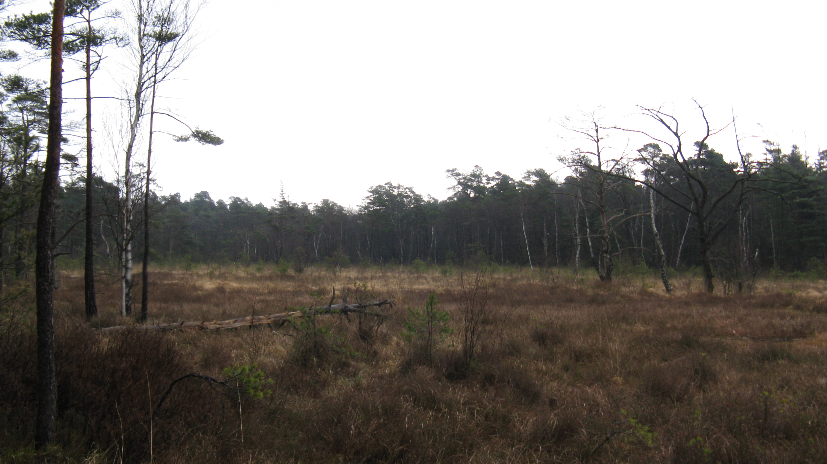 Blick über das Hiddeser Bent; Naturschutzgebiet „Donoperteich–Hiddeser Bent“ in Detmold